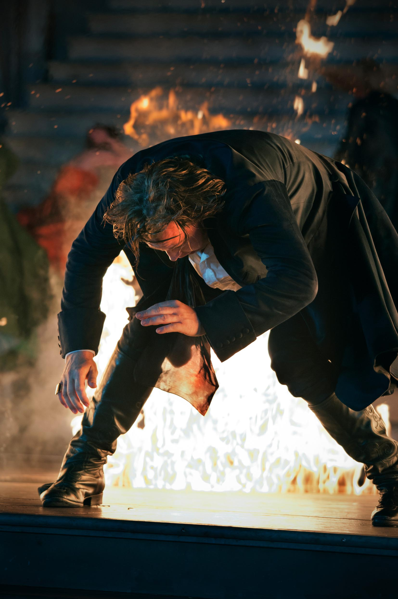 Salzburger Festspiele 2012 - Nicholas Ofczarek als Jedermann